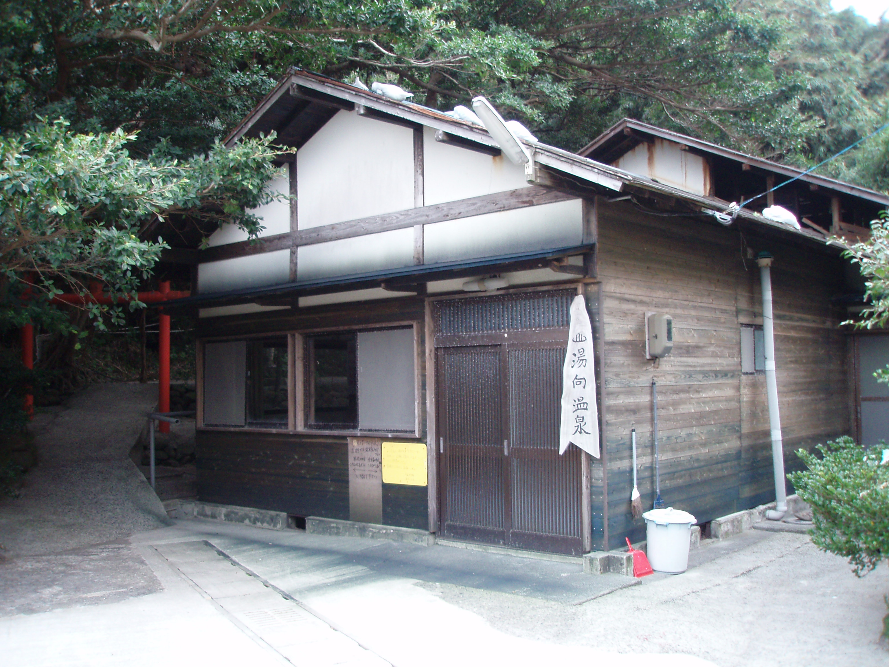 鹿児島県屋久島町口永良部島湯向温泉